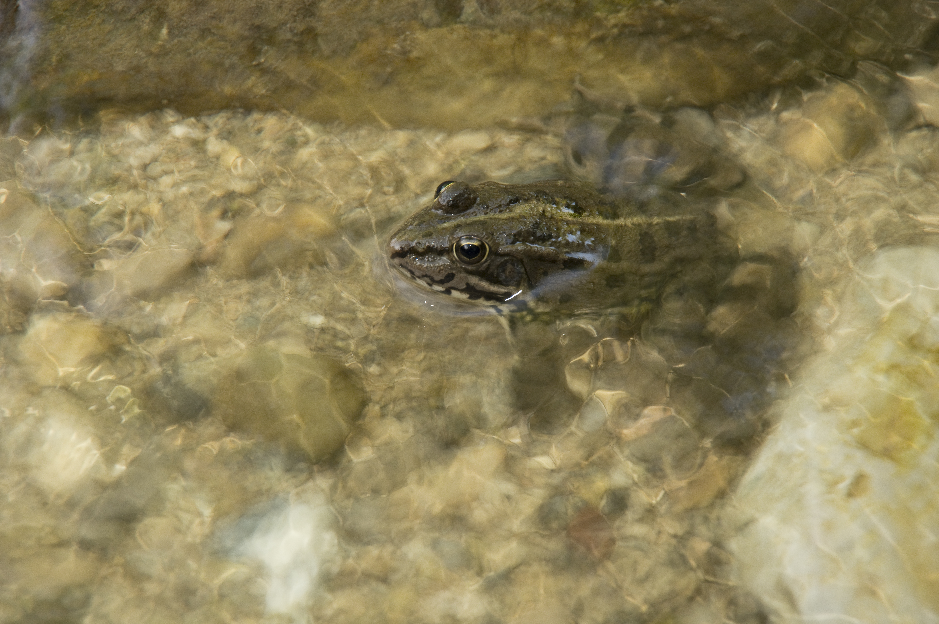 Rana en el río El Bosque, Sierra de Grazalema This is a photography of a Special Area of Conservation in Spain with the ID: ES0000031. Natura2000 entry, EEA entry